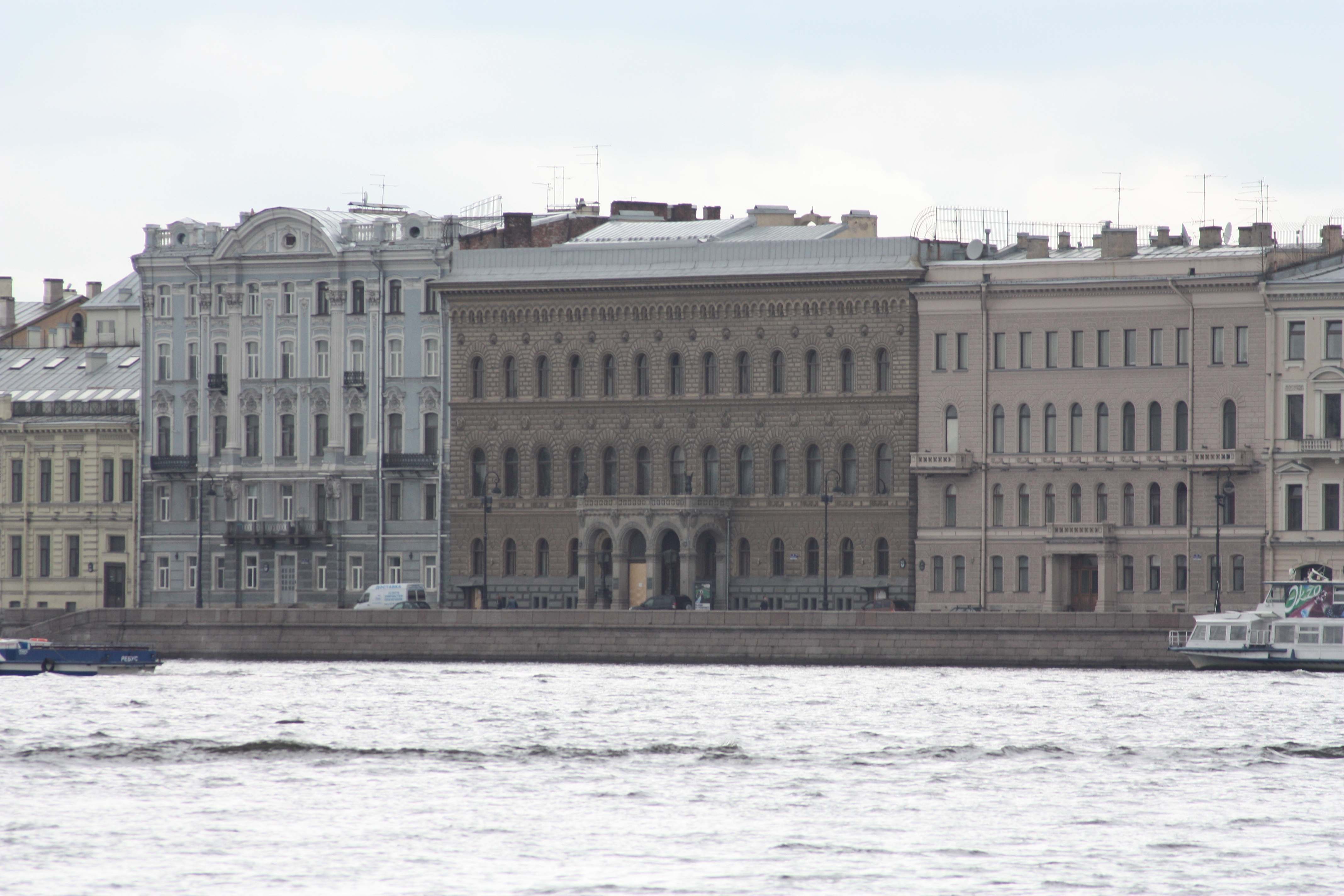 Sankt Petersburg; 2009; Touristenfotos